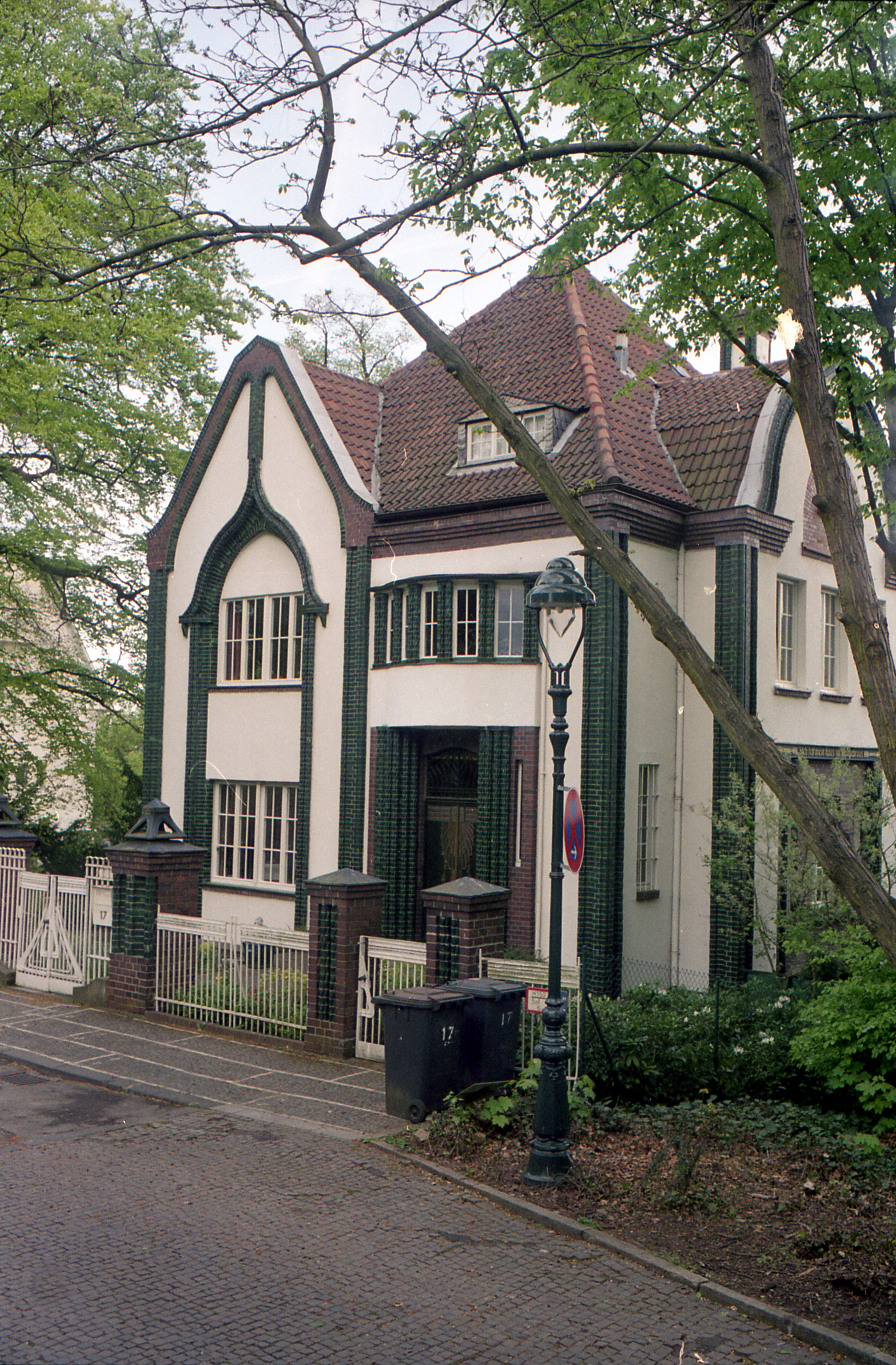 Дом Беренса в Колонии художников в Дармштадте